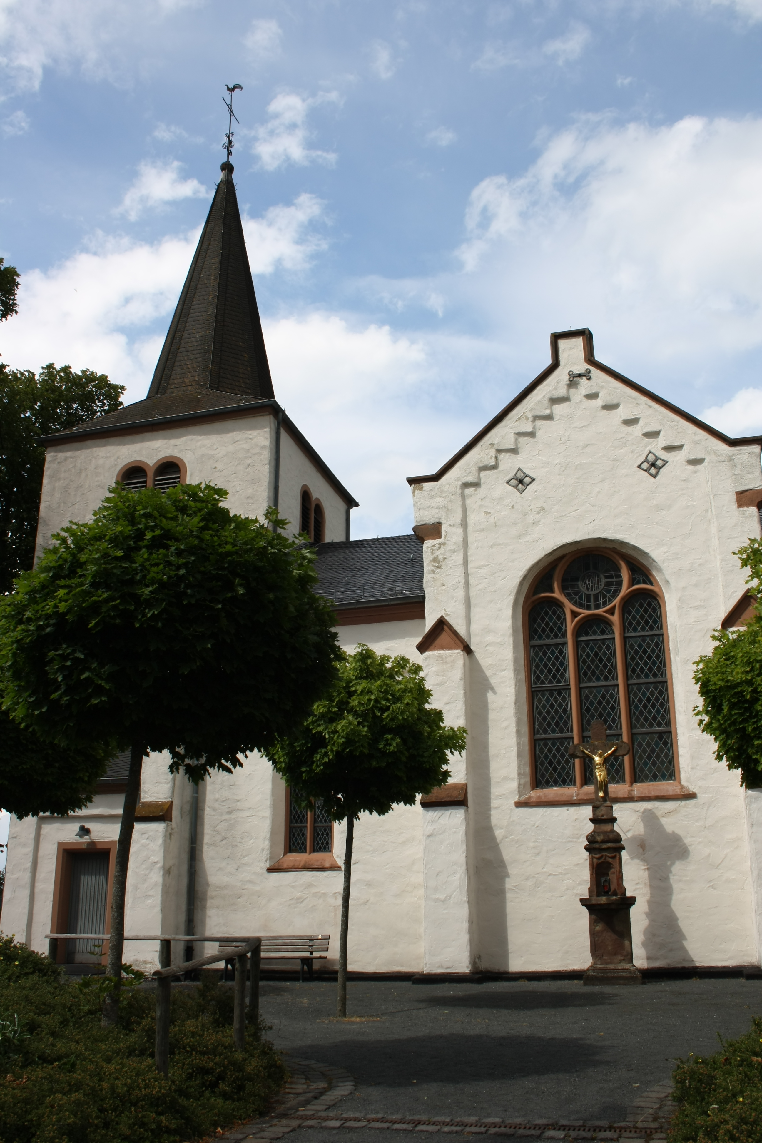 Katholische Pfarrkirche St. Cyriacus in Hümmel, Außenaufnahme mit Kreuz